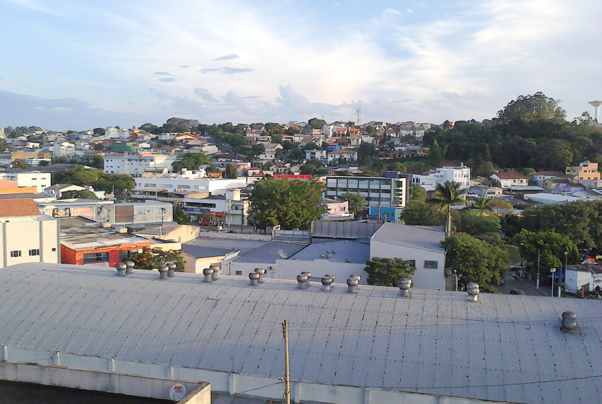 Vista de Arujá, SP, Brasil.